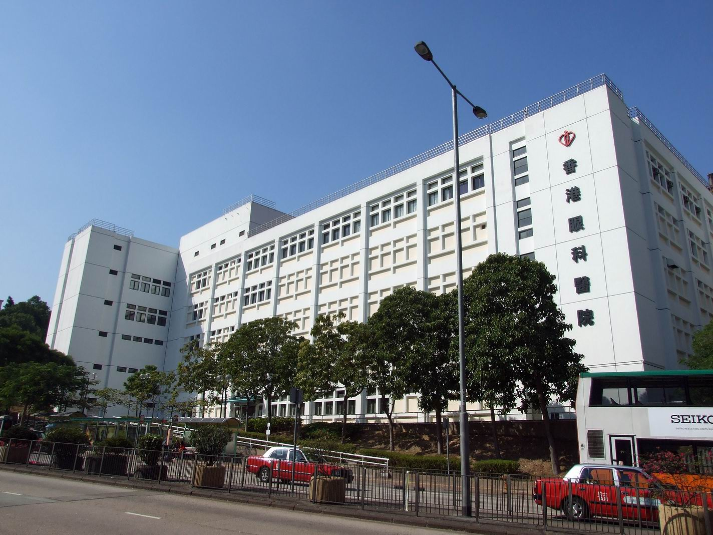 香港眼科醫院